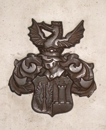 Grb Petra Zrinskog u zagrebačkoj katedrali